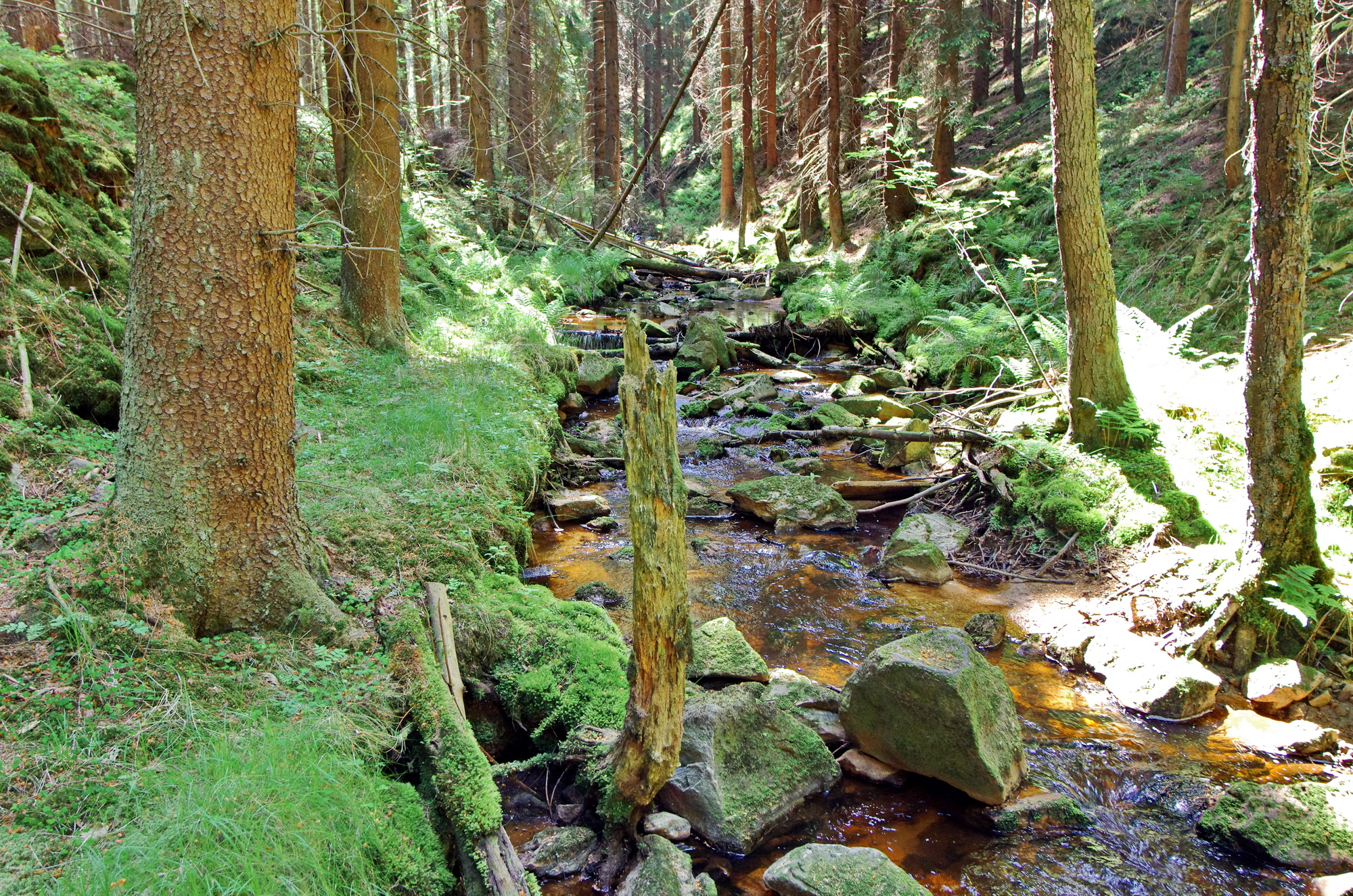 Čistý potok (někdy též Komáří potok) ve Slavkovském lese, okres Sokolov